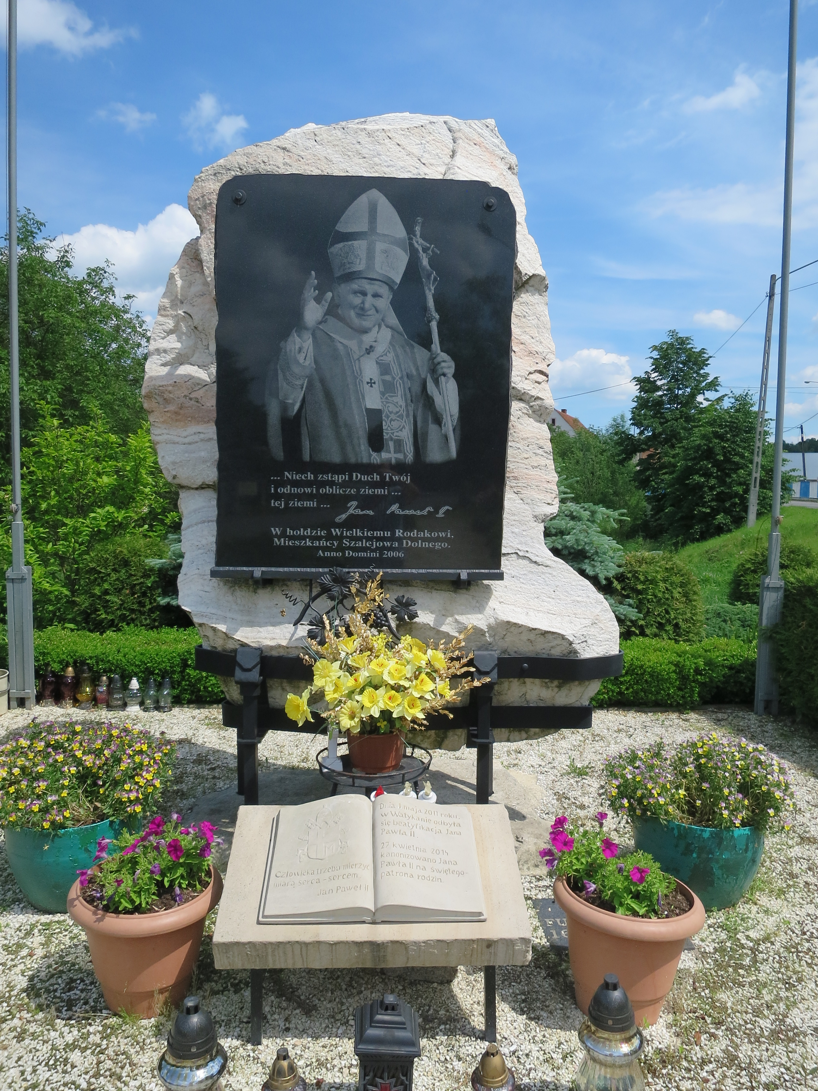 Denkmäler, die zur Tour der Denkmäler in Ober- und Niederschwedeldorf gehören.